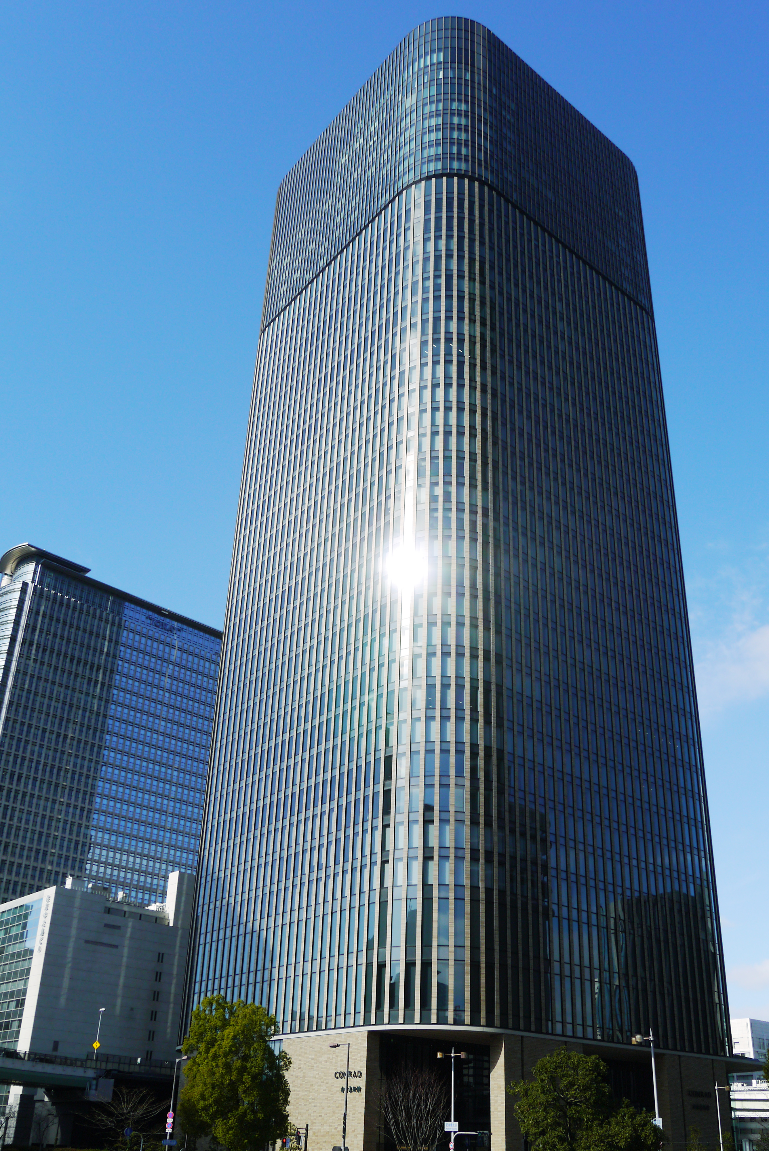 Conrad Osaka (コンラッド大阪), Osaka, Osaka prefecture, Japan